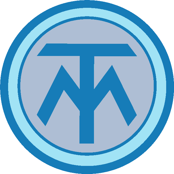 Logo de la marque automobile Turcat-Méry